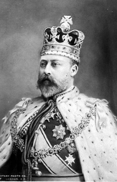 Edouard VII (1841-1910), roi de Grande-Bretagne, roi d'Irlande, empereur des Indes (règne : 22/01/1901-06/05/1910). Image d'archive destinée à dater les peintures murales de l'Haveli Kedia, à Fatehpur (Rajasthan) sur lesquelles figurent l'Empereur et l'Impératrice.